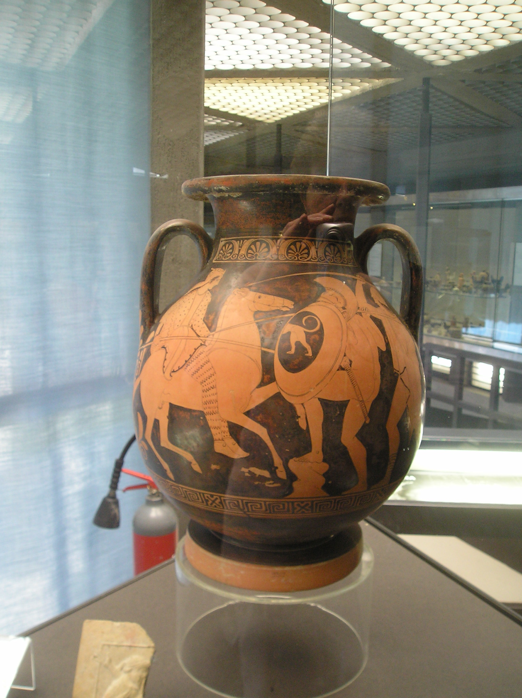 Vaso greco, esposto nel Museo archeologico regionale di Siracusa "Paolo Orsi".